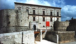 Castle Sanseverino in Teggiano, Italy